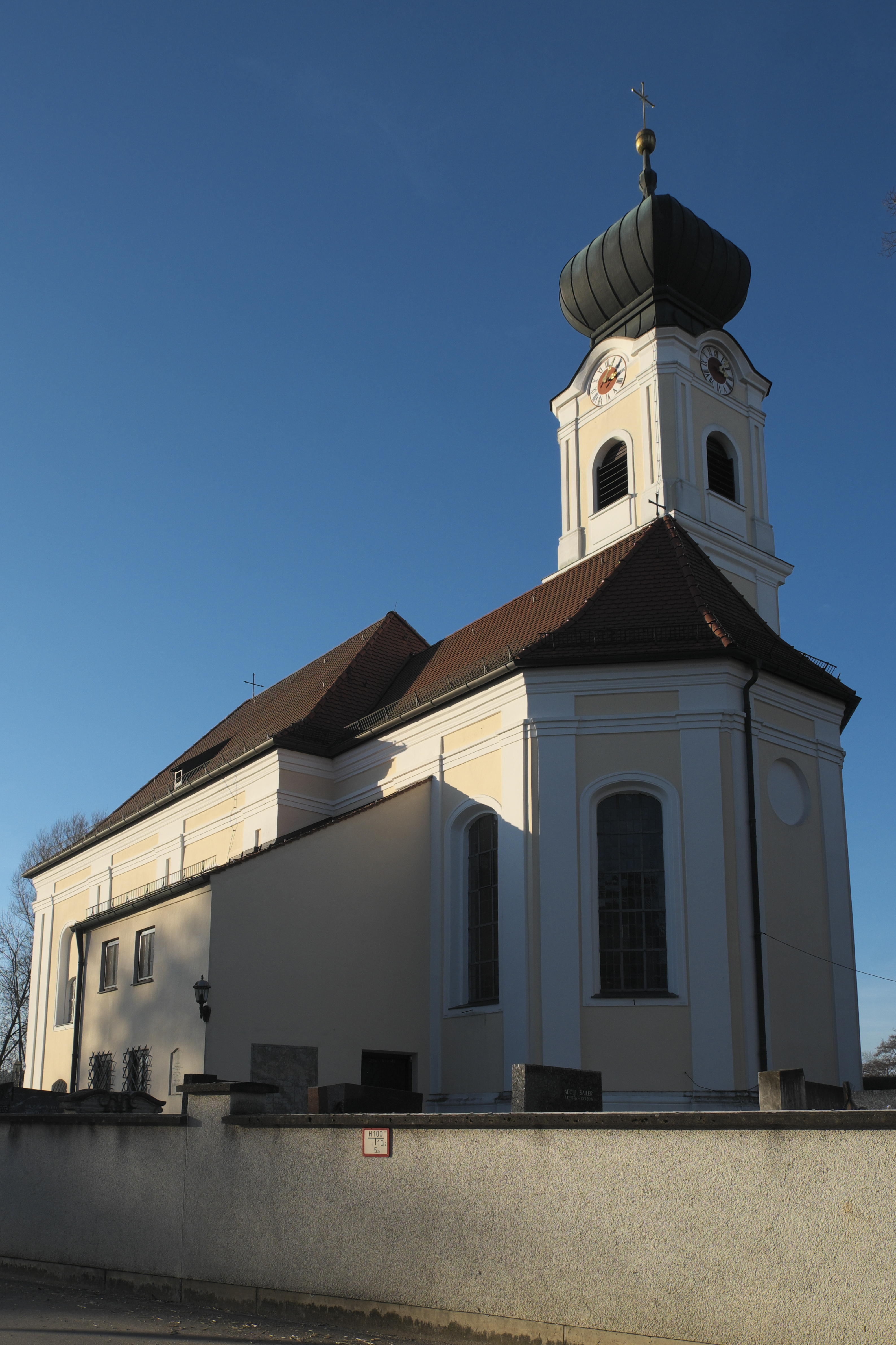 Katholische Pfarrkirche Mariä Himmelfahrt in Klingen (Aichach) im schwäbischen Landkreis Aichach-Friedberg (Bayern/Deutschland)